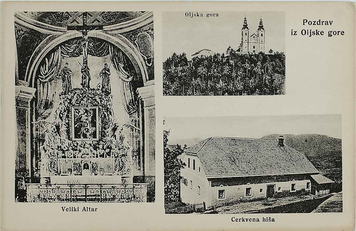 Razglednica Polzele.